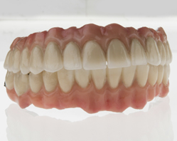 Totale Gebissrekonstruktion festsitzend auf Implantaten, Aussenansicht